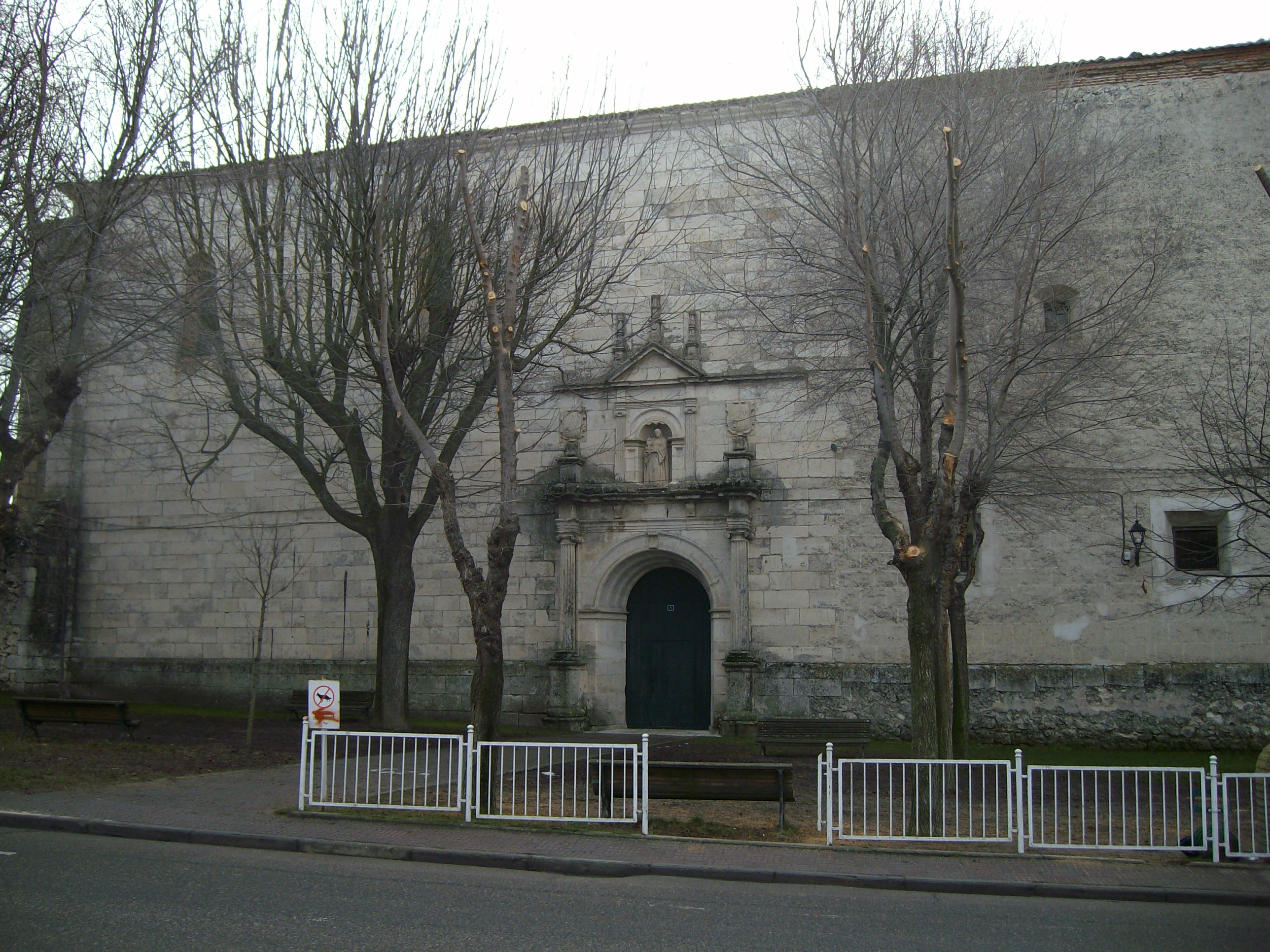 Fachada principal del monasterio de Santa Clara (Cuéllar)